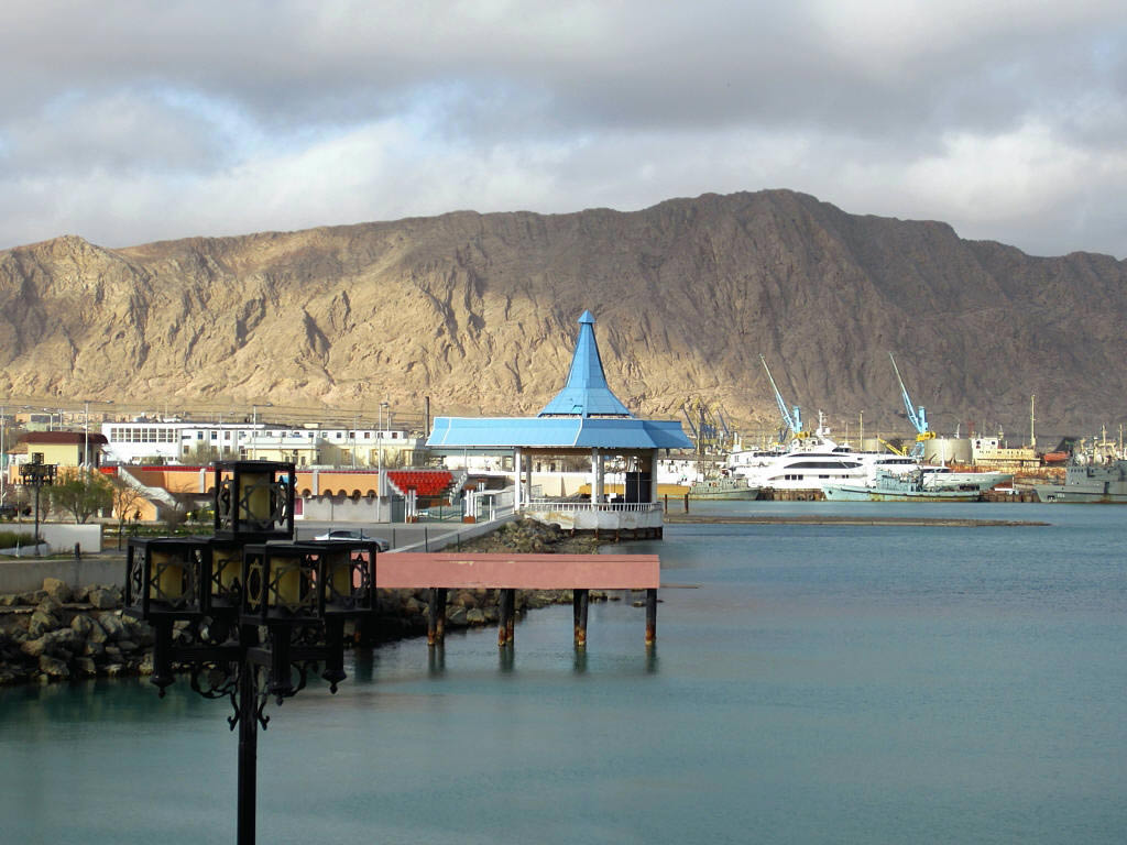 Город Туркменбаши